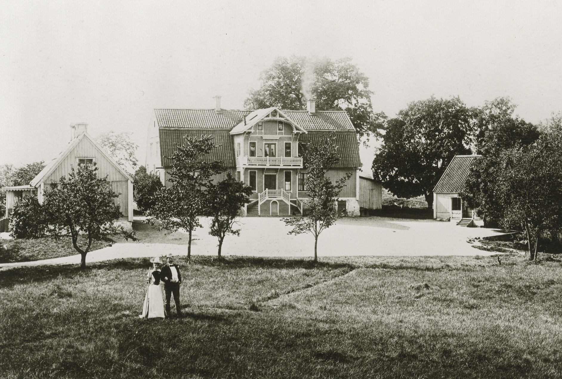 Hammarby gård. Troligen är det den dåvarande arrendatorn Otto Almgren med fru som är fotograferade framför huvudbyggnaden. Plats: Kvarteret HAMMARBY GÅRD. Södra Hammarbyhamnen. Beteckning: Fa 30776